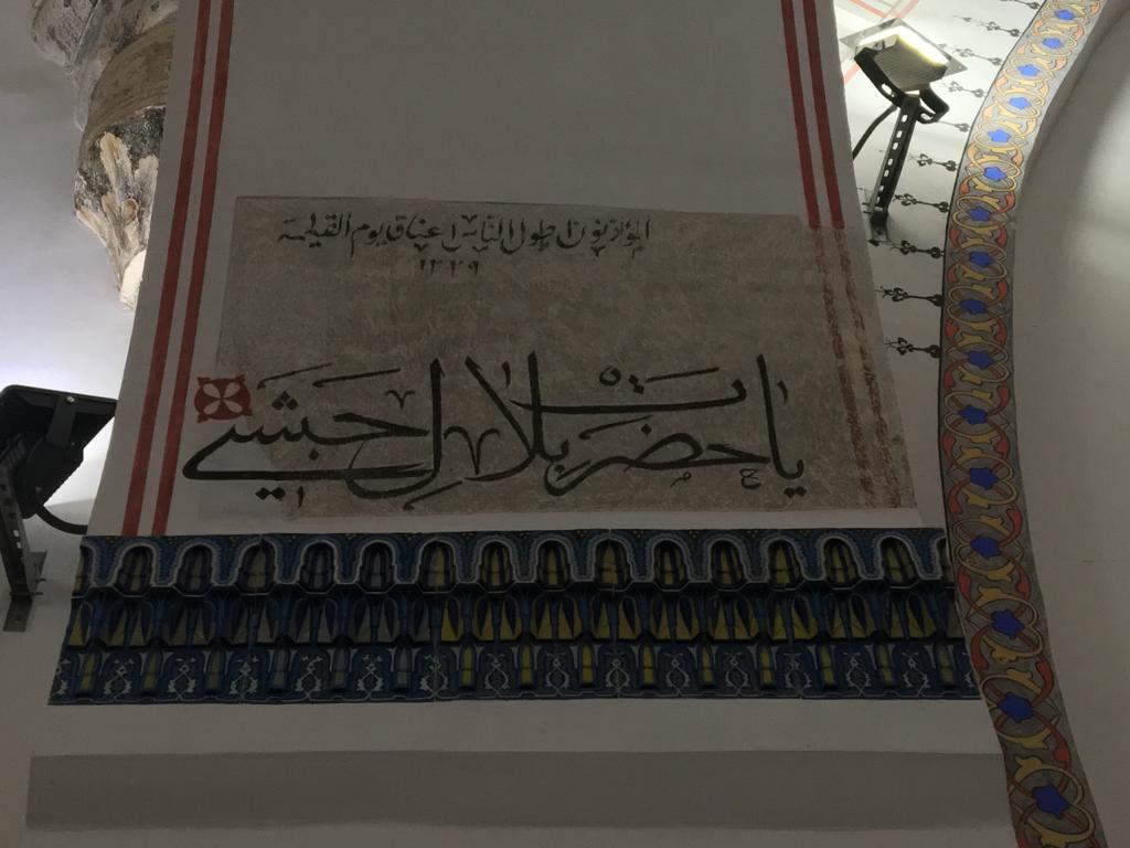 sülüs hat